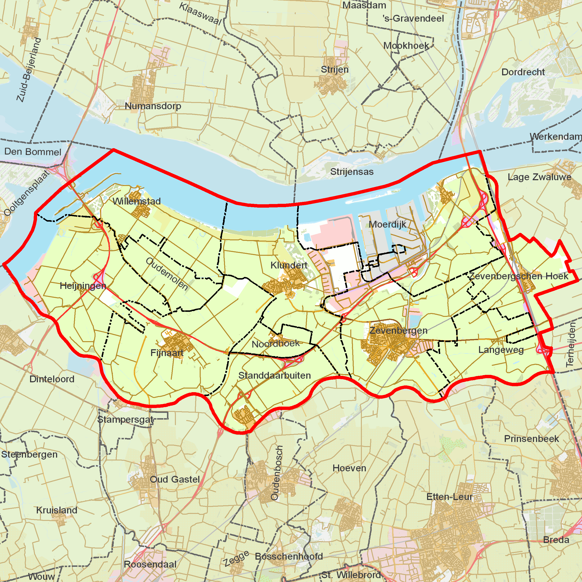 BAG woonplaatsen - Gemeente Moerdijk.png